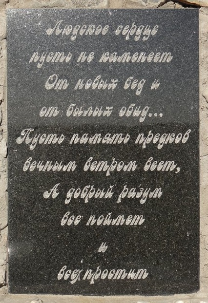 Надпись на памятнике башкирке. Самарская область